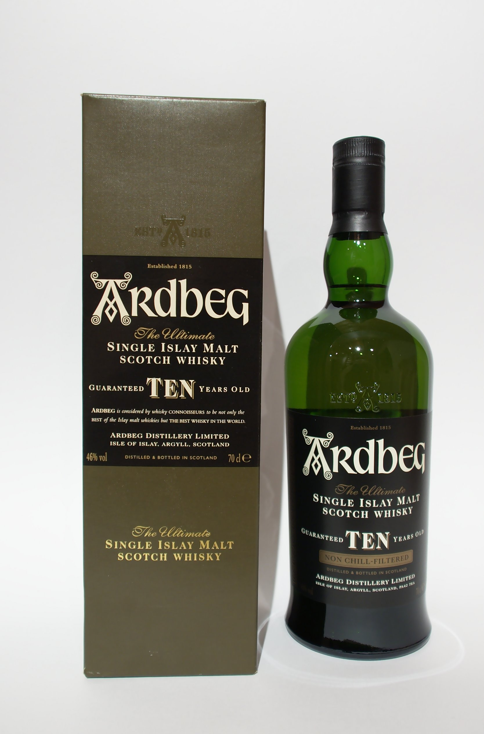 Flasche + Karton von Ardbeg TEN